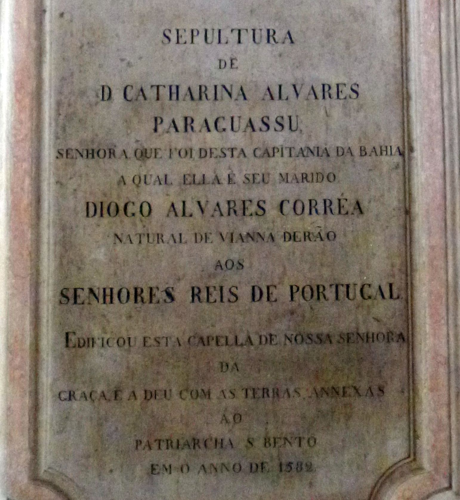 Grabplatte Catarina Paraguacu